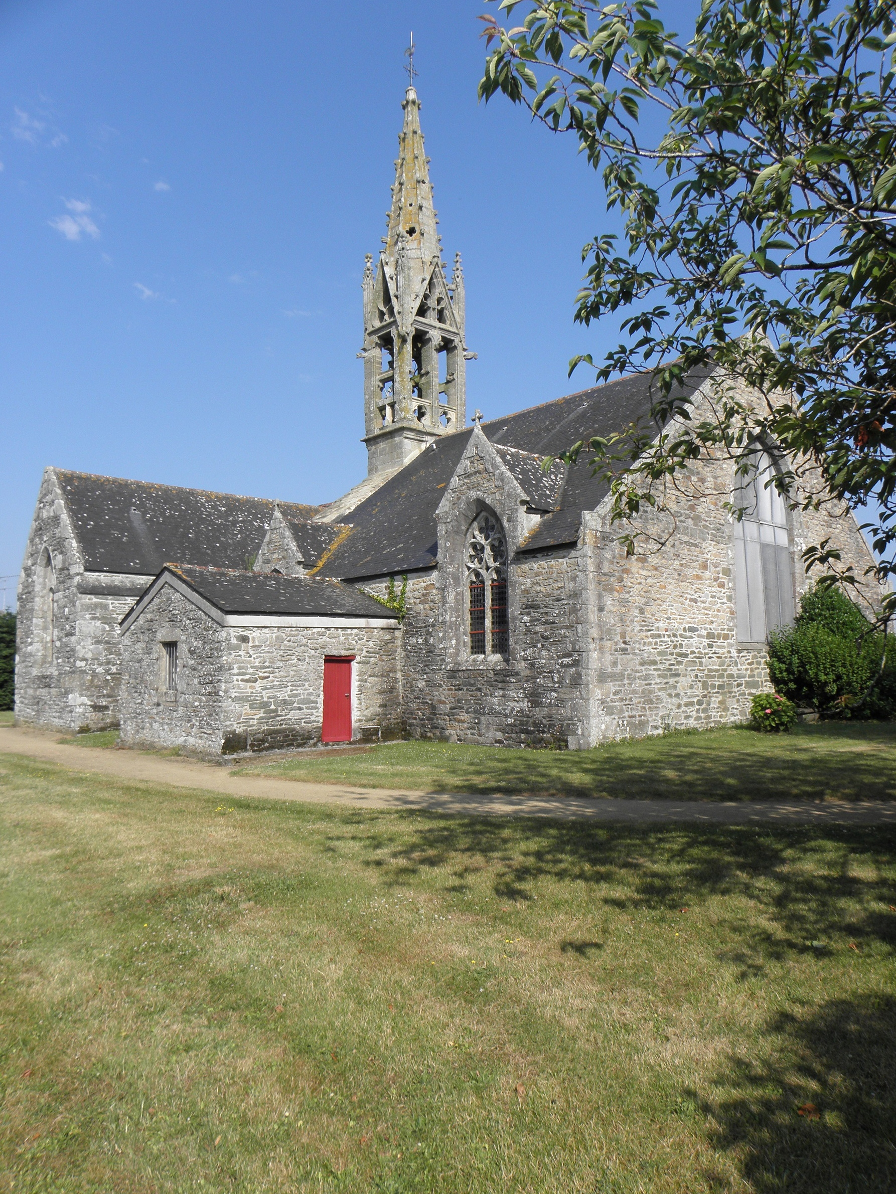 Église Saint-Annouarn de Peumerit (29). Chevet et flanc sud.